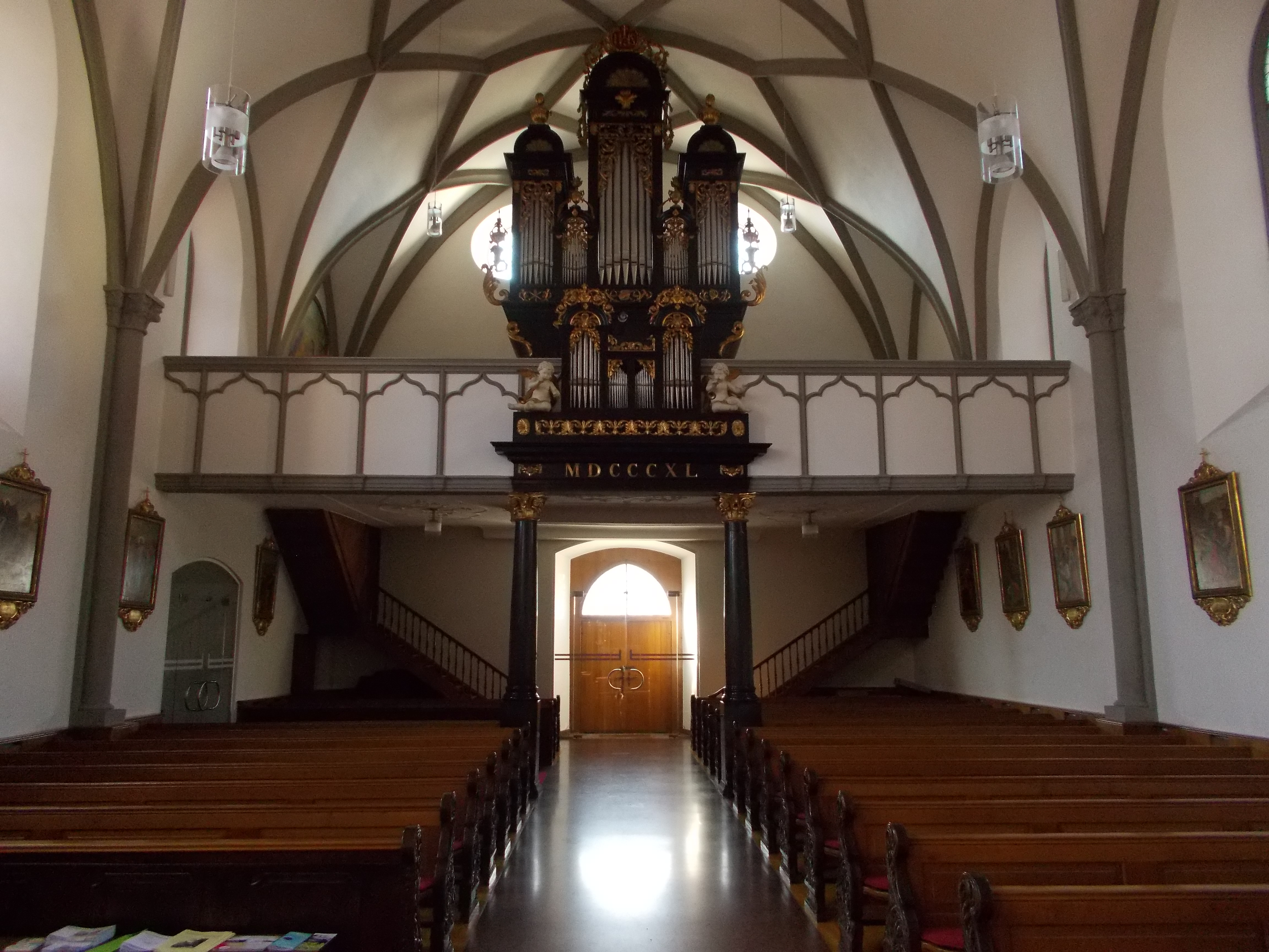 Innenraum der Laurentiuskirche mit Blick auf Mauracher - Orgel von 1836 und Orgelempore von 1840 (römische Jahreszahl)